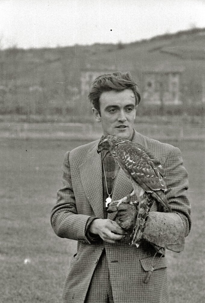 Título original: Félix Rodríguez de la Fuente realizando una exhibición con una rapaz en el hipódromo de Lasarte (3/4) Localización: San Sebastián (Guipúzcoa)